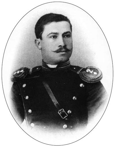 Владислав Ковачев.